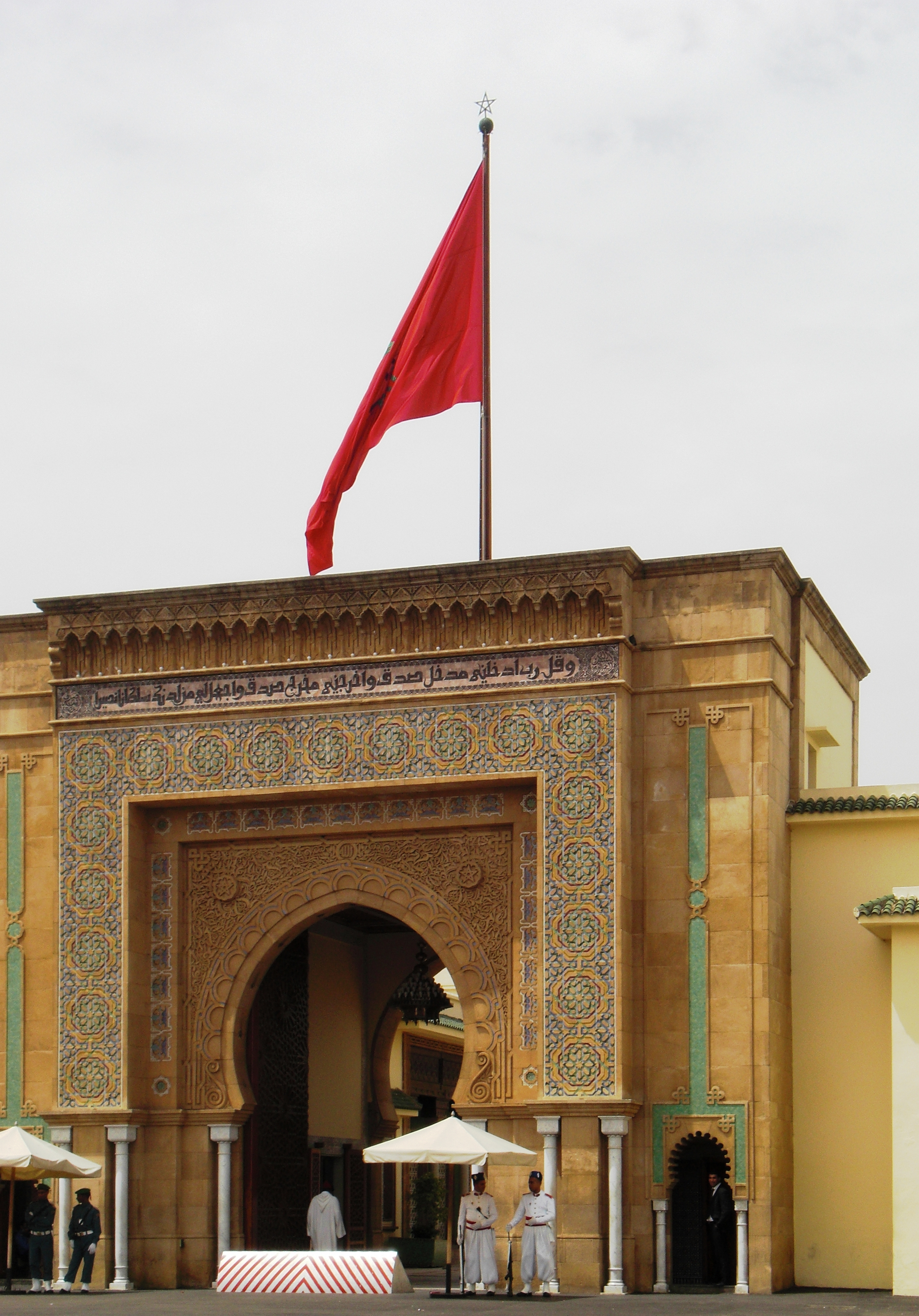 Tor am Königspalast in Rabat.